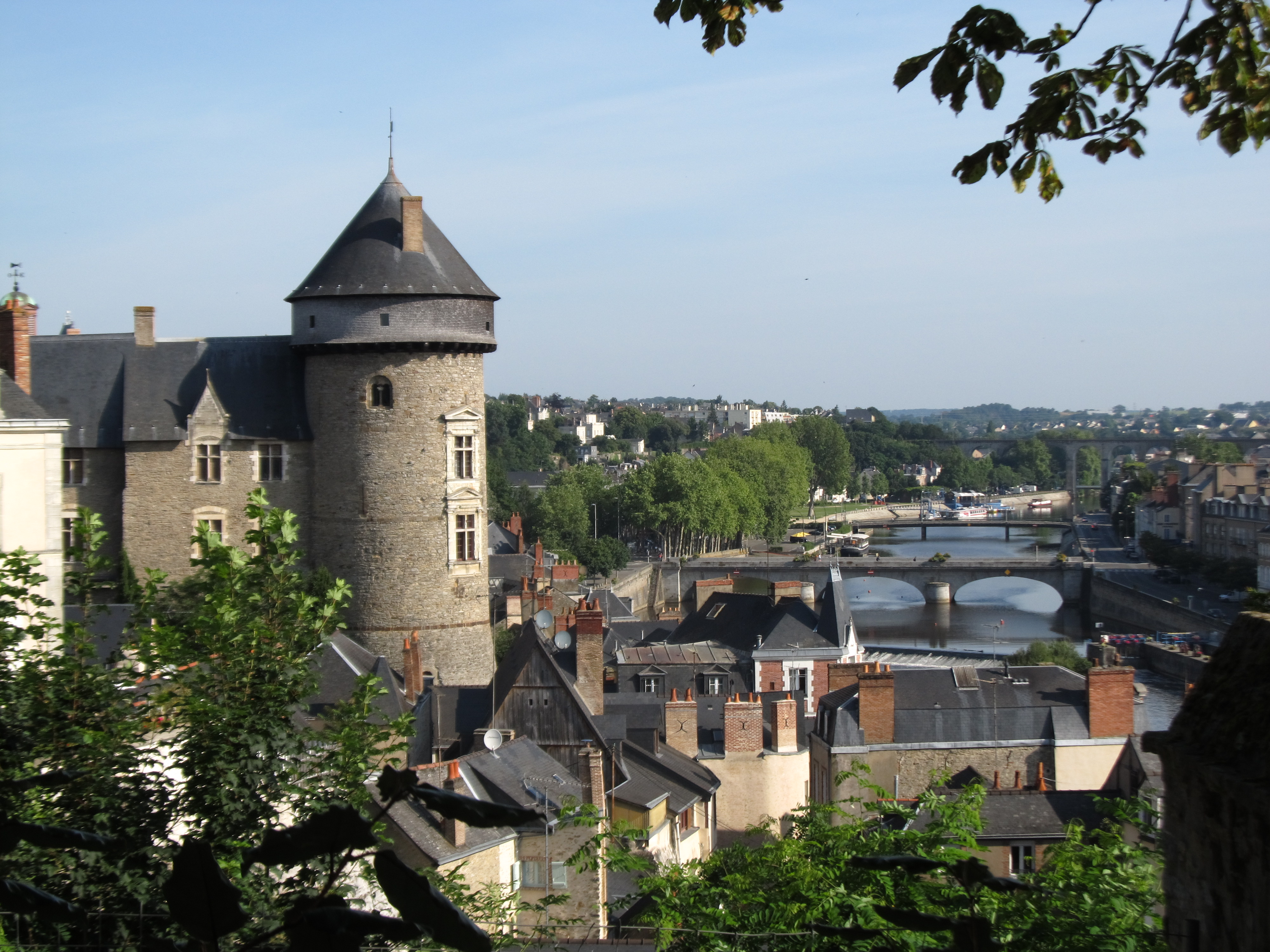 Chateau Vieux, Laval, Mayenne, France